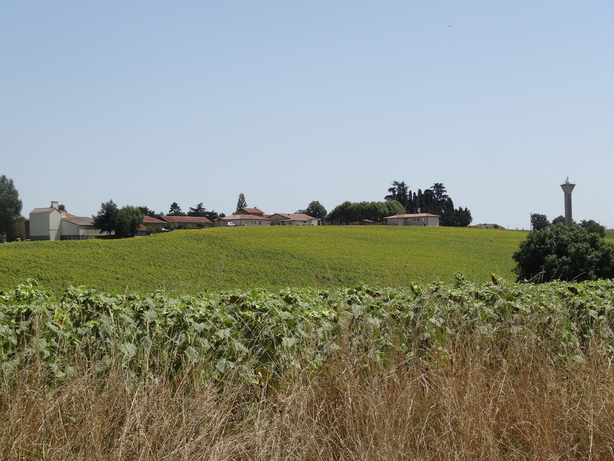 Le village d'Aussos ainsi que le château d'eau